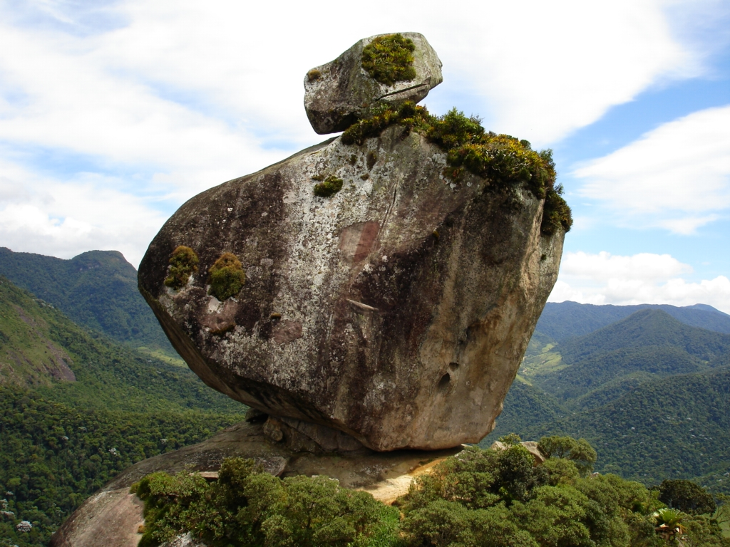 Pico do Peito de Pombo, em Sana